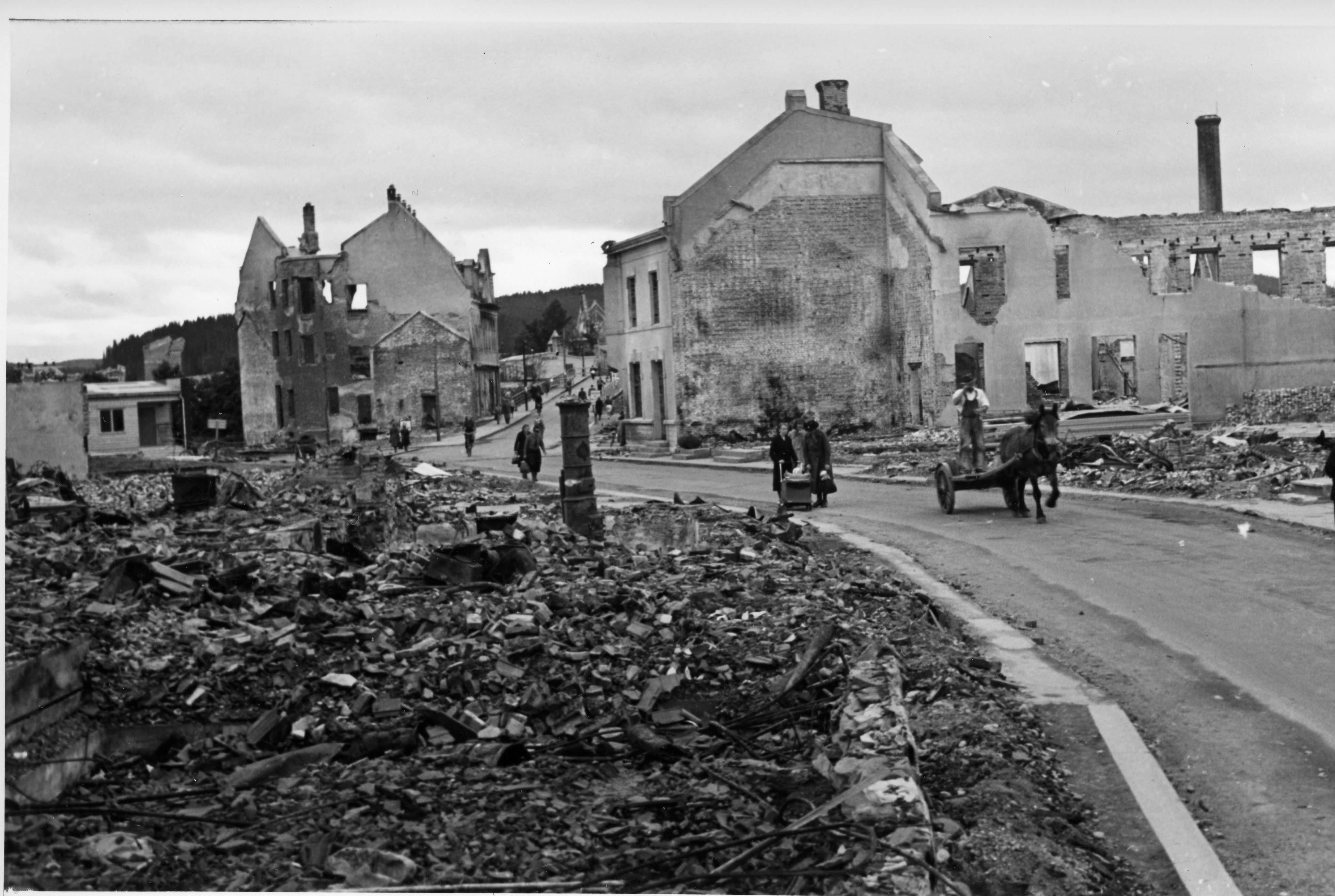 Bildet er hentet fra Arkivverket. Ødeleggelser i Steinkjer etter bombing våren 1940. Arkivinstitusjon : Riksarkivet Arkivnavn : Løken, Hallvard Sted : Norge, Nord-Trøndelag, Steinkjer, Steinkjer Emneord: 2. verdenskrig, Andre verdenskrig Avbildet